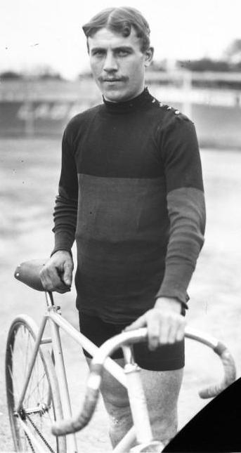 Odile Defraye [portrait du coureur cycliste avant le départ]